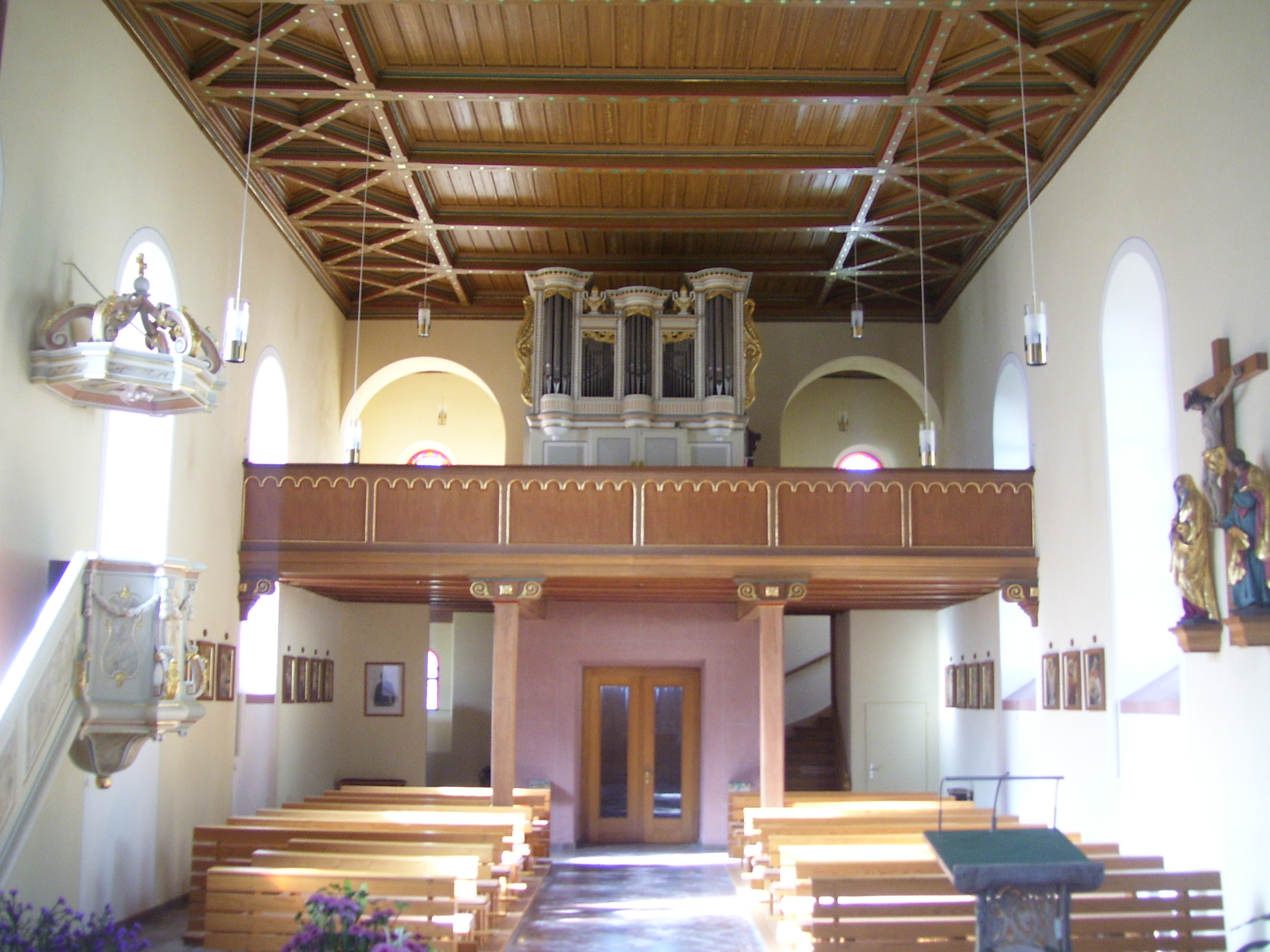 Die Ubhaus-Orgel von 1817 in der katholischen Kirche in Bobenthal.